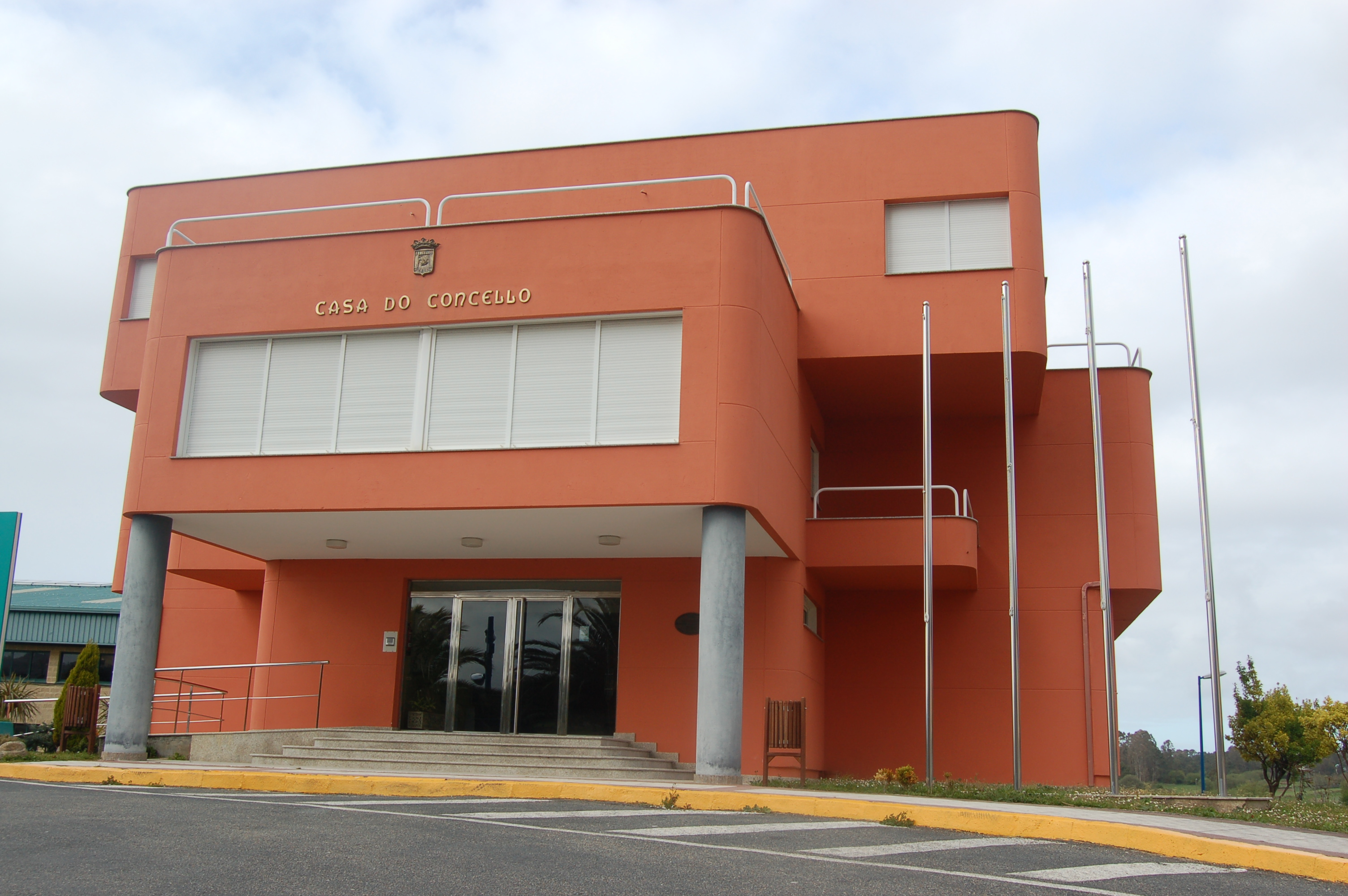 casa consistorial de Cabana de Bergantiños Cabana de Bergantiños Categoría:Imaxes de Cabana de Bergantiños